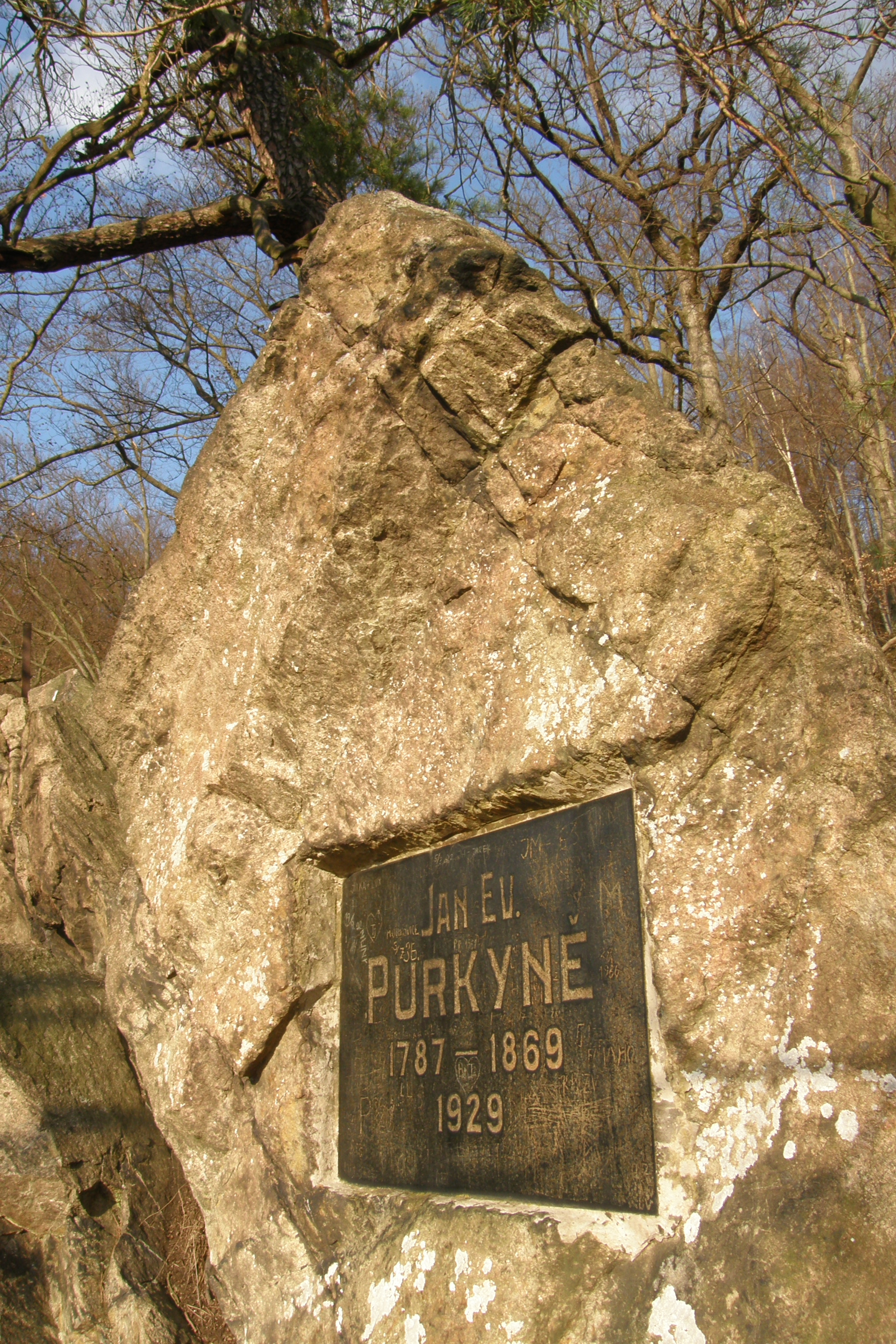 Památník Jana Evangelisty Purkyně v Lesnickém Slavíně u Adamova